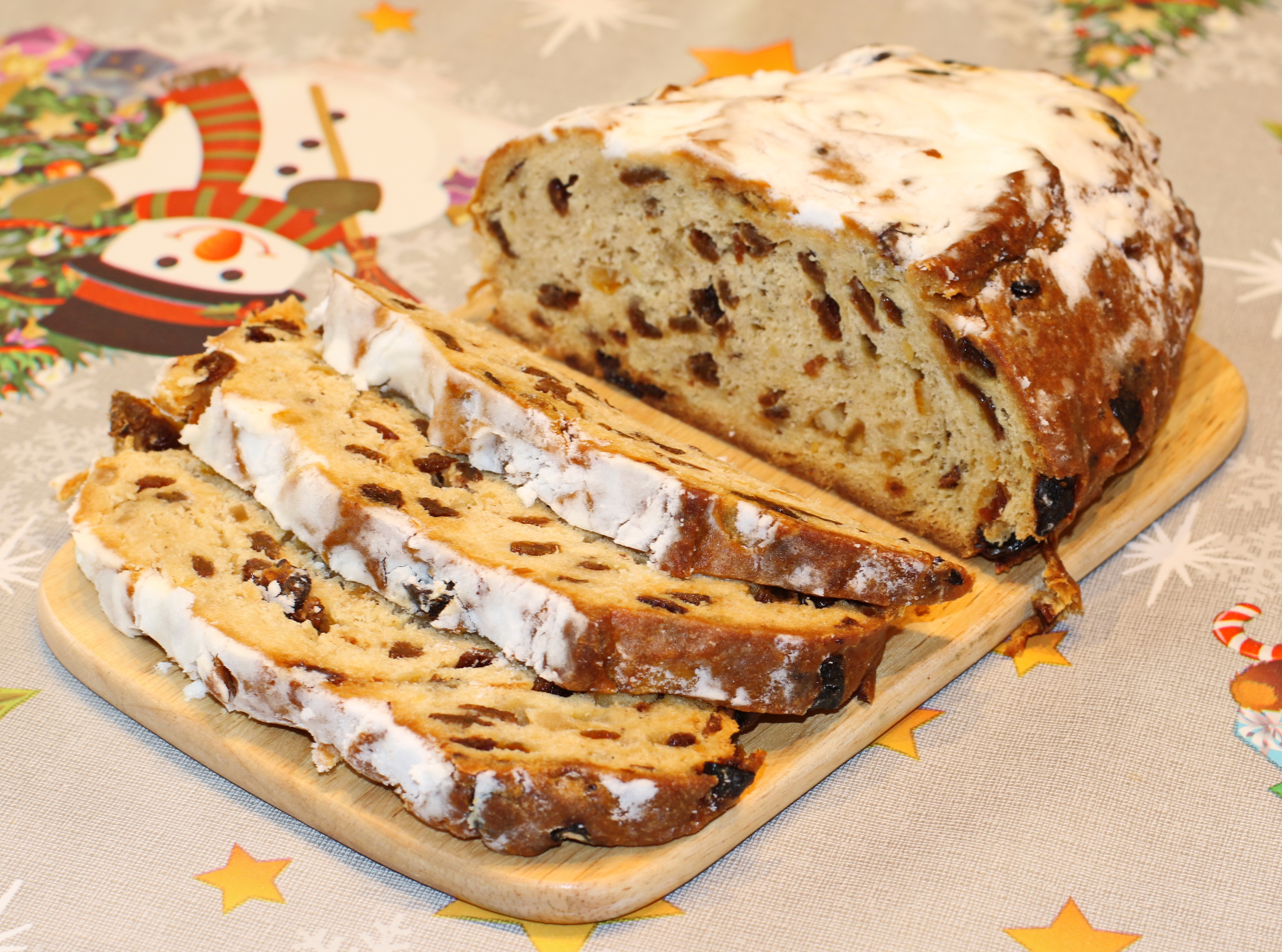 Angeschnittener Christstollen. Erzgebirgskreis, Sachsen. This photo has been taken in the country: Germany